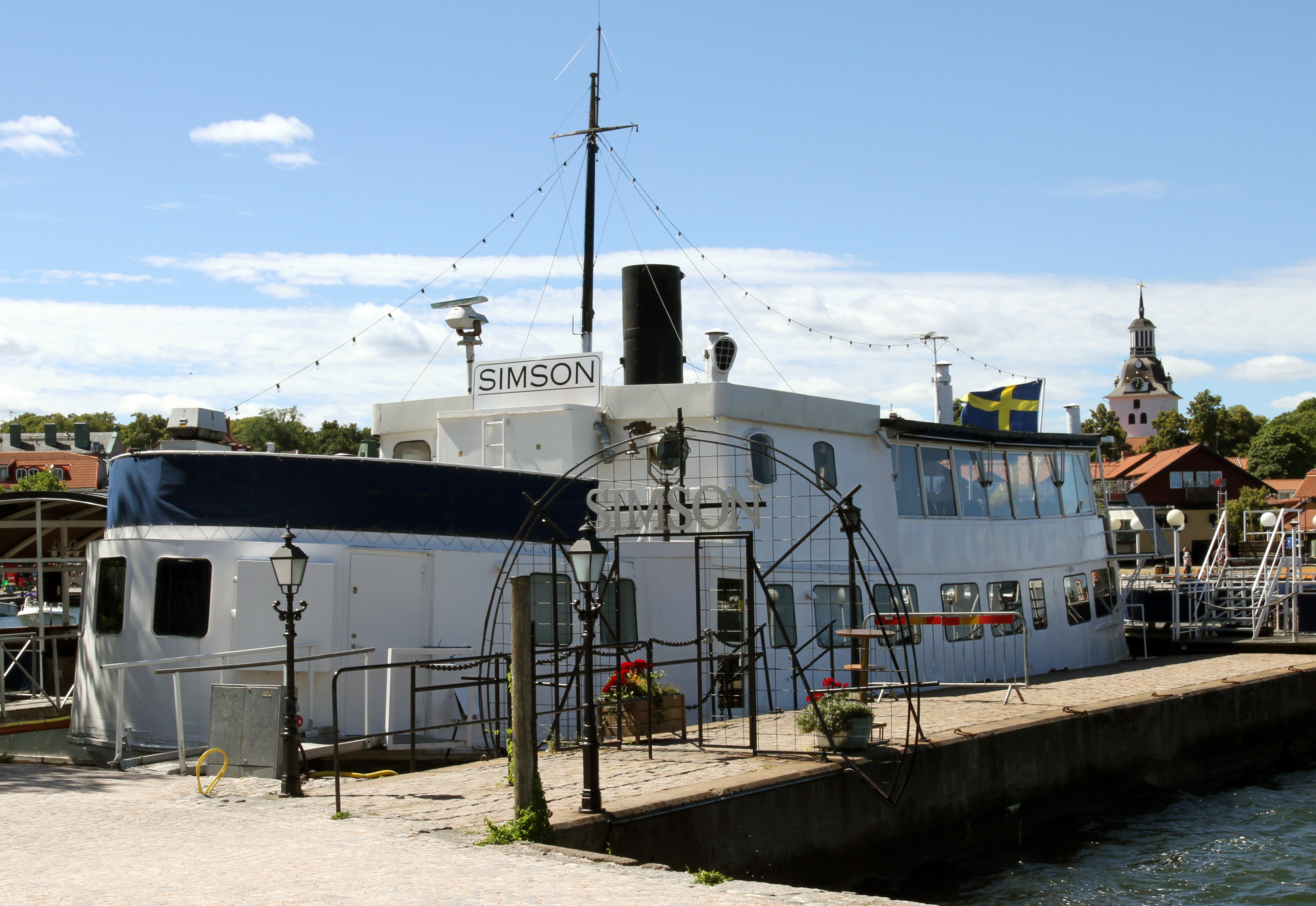 Simson i Västervik 20 juli 2013